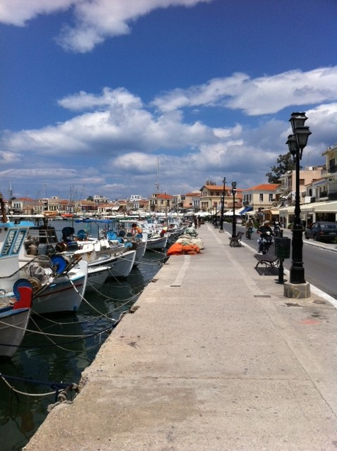 Aegina